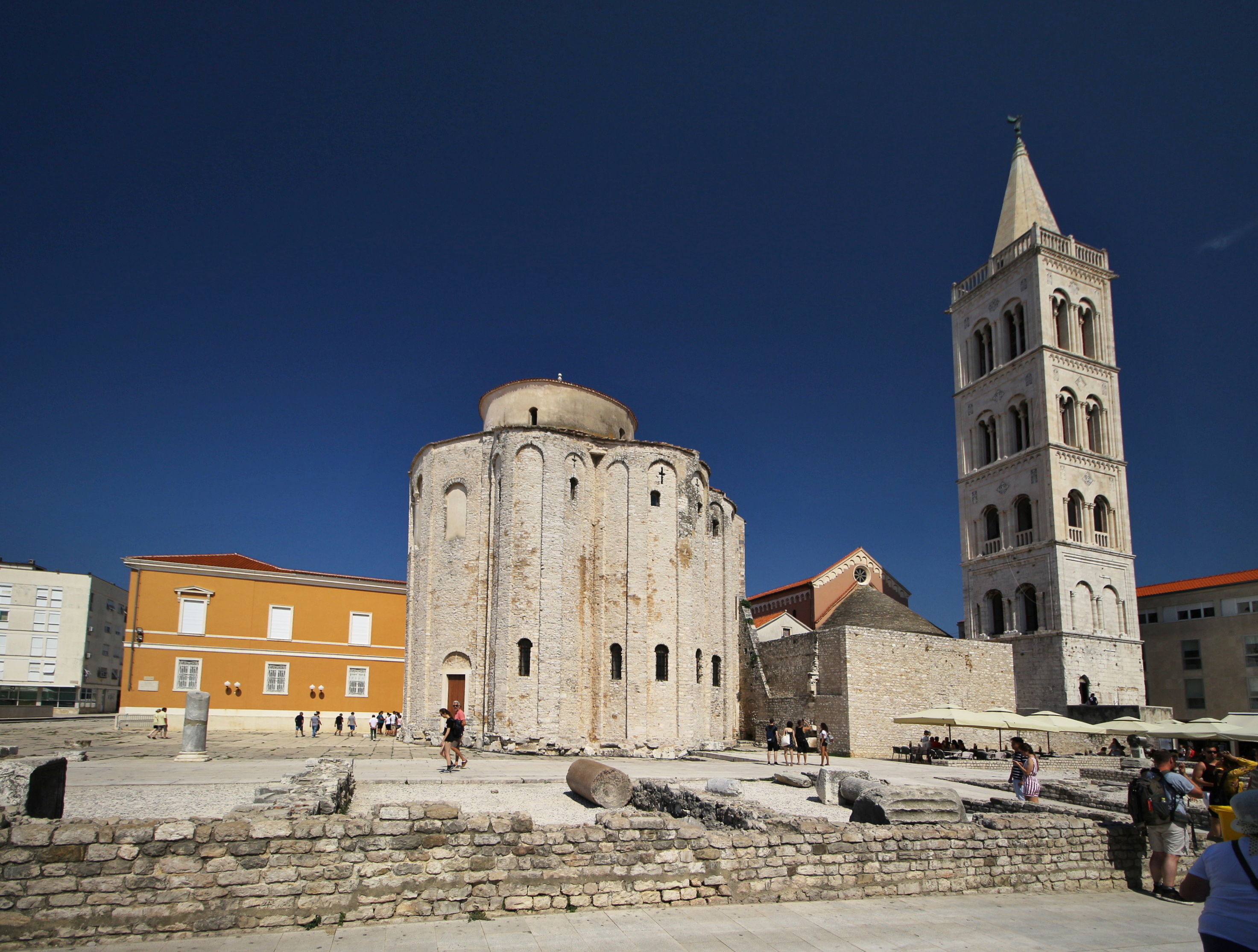 Kostel svatého Donáta v Zadaru